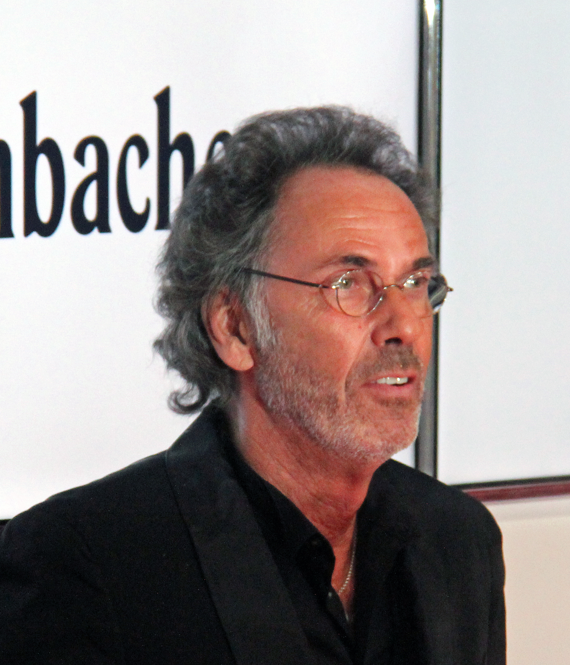 Hugo Egon Balder bei der Goldenen Kamera 2012